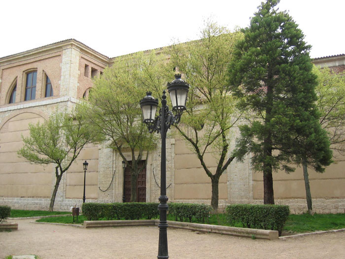 Valladolid – España (Spain) - Monasterio de las Huelgas Reales: Es el único resto de arquitectura mudéjar de la ciudad. La iglesia actual se finalizó en el año 1600.